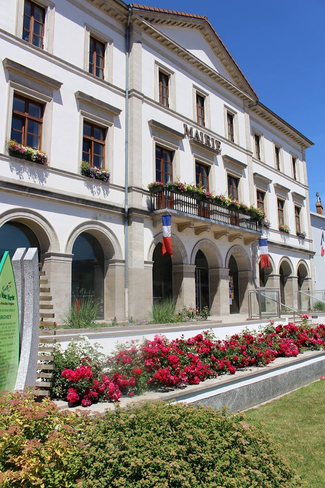 mairie fleurie